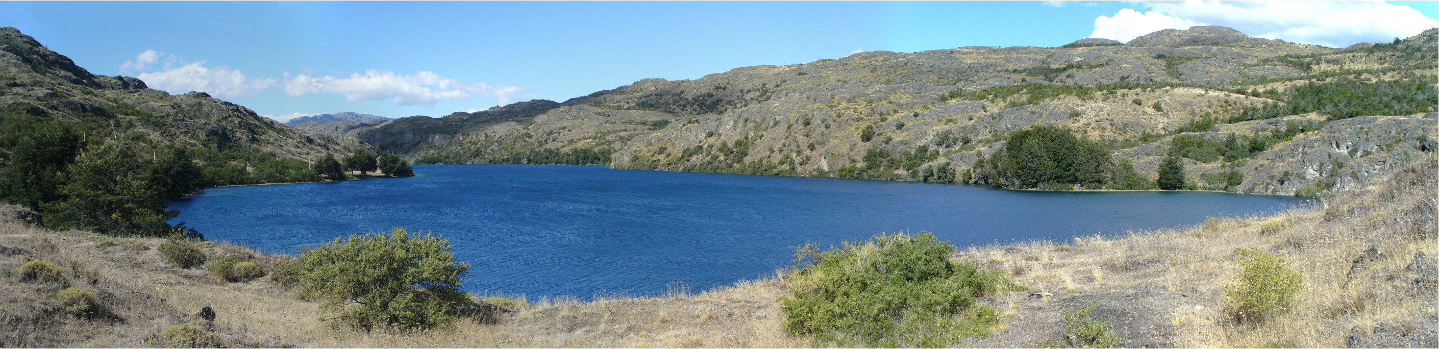 Lago Cochrane, Chile